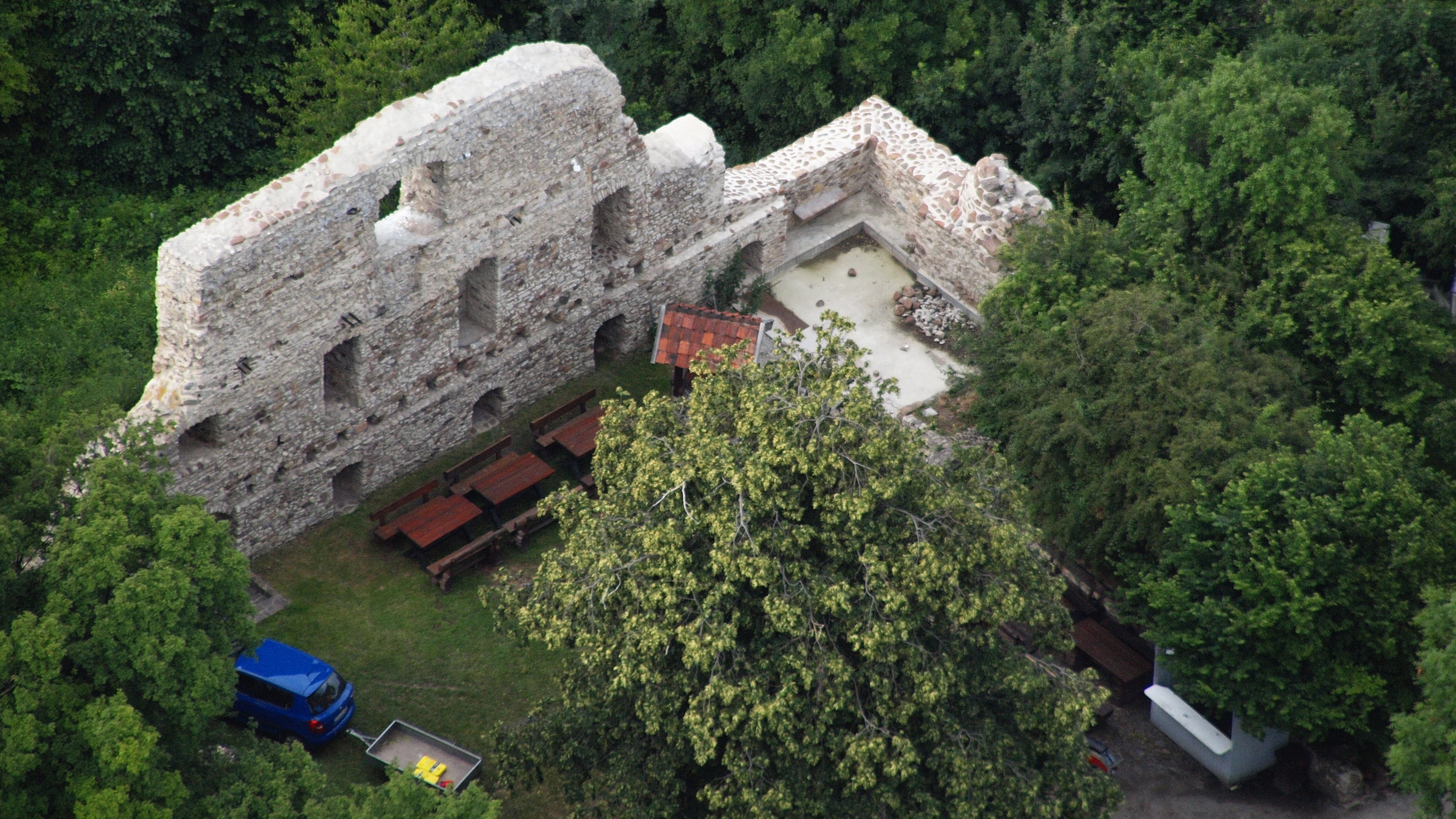 Burg Stapelburg aus nordöstlicher Richtung, Luftaufnahme (2015)